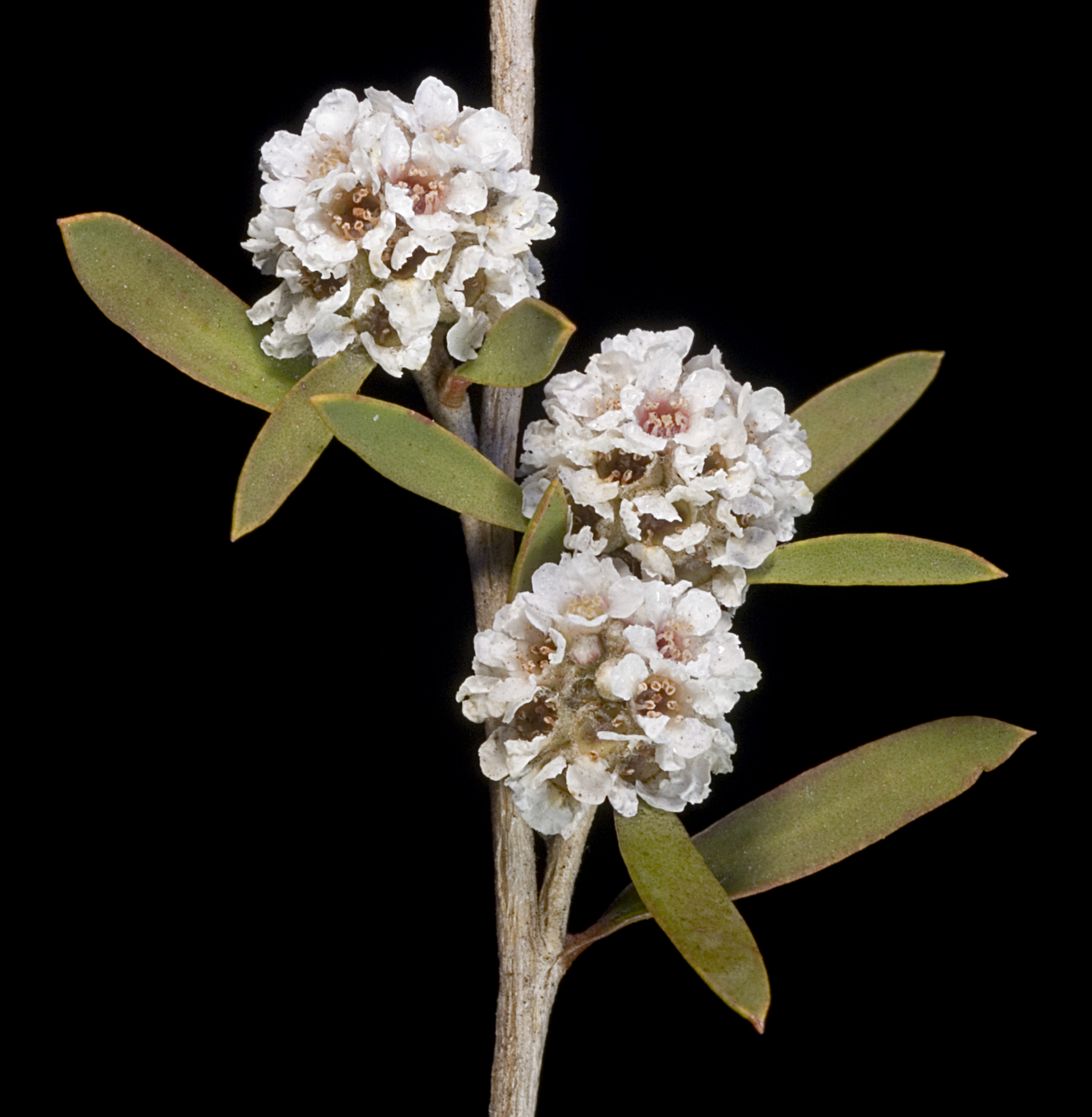 KRT3479